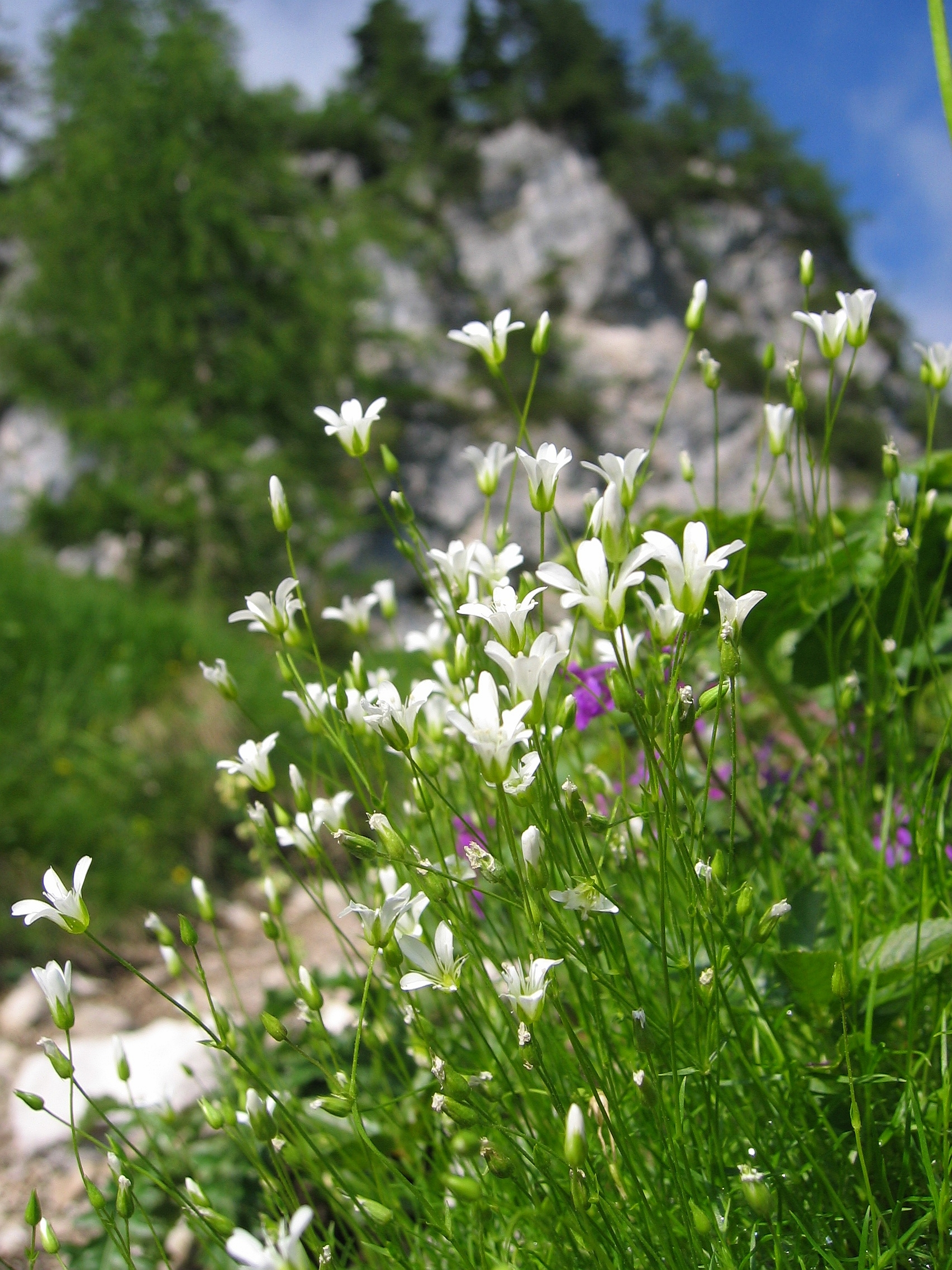 Minuartia austriaca, Near Rinnerhütte, ~1300 m, Upper Austria, Austria